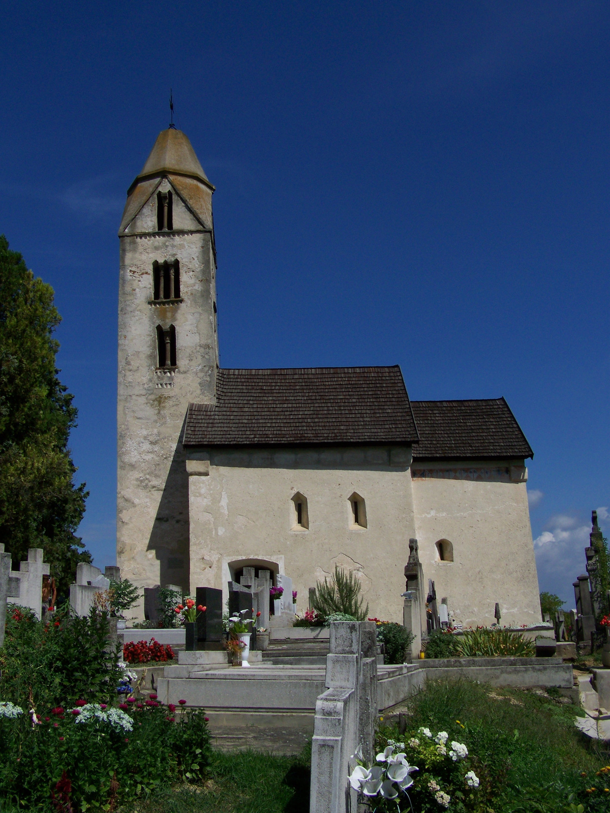 R. k. templom (Hévíz, EGREGY, Dombföldi u., temető) This is a photo of a monument in Hungary, Identifier: 10833